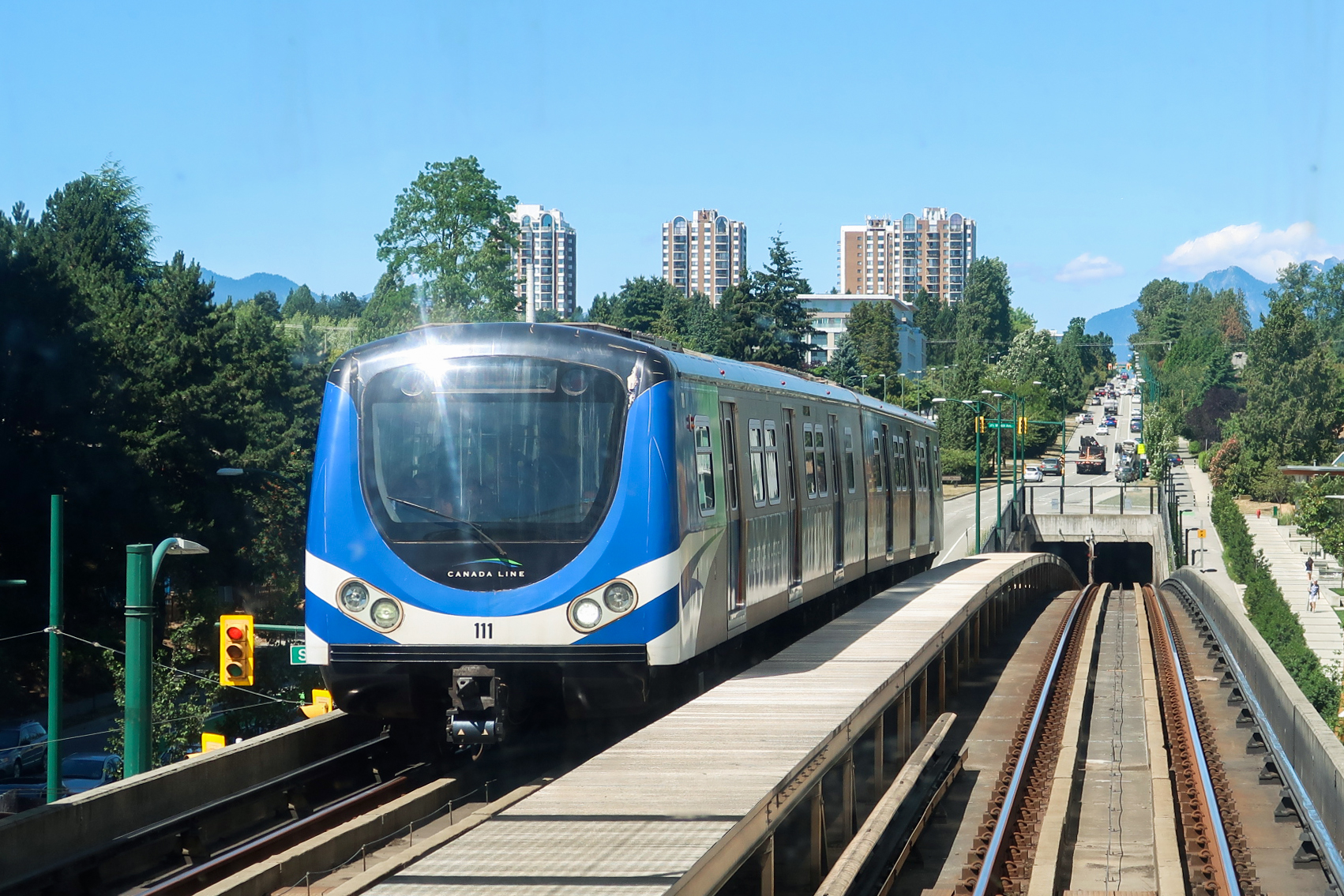 Canada Line Train